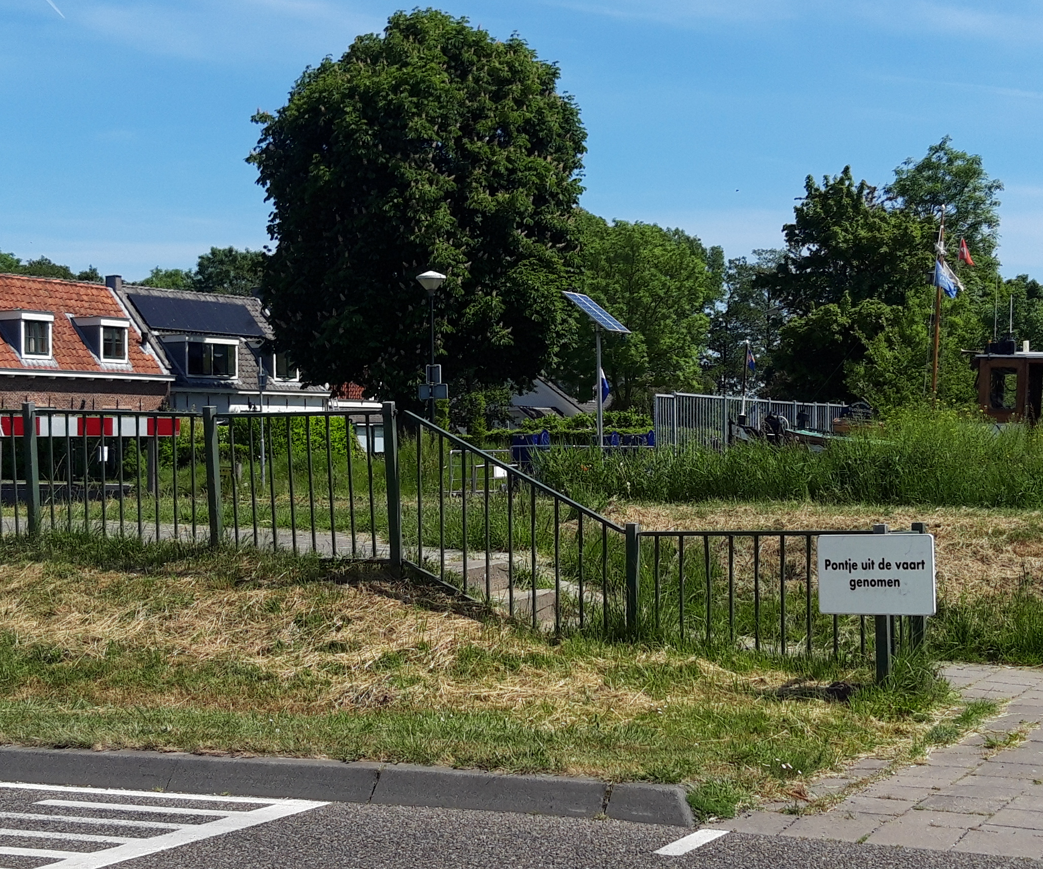 pontje over de Grecht vanaf 6 april 2020 buiten gebruik genomen vanwege de Covid-2019 pandemie. Het handbediende pontje is te klein om er 1,5 m afstand op te houden